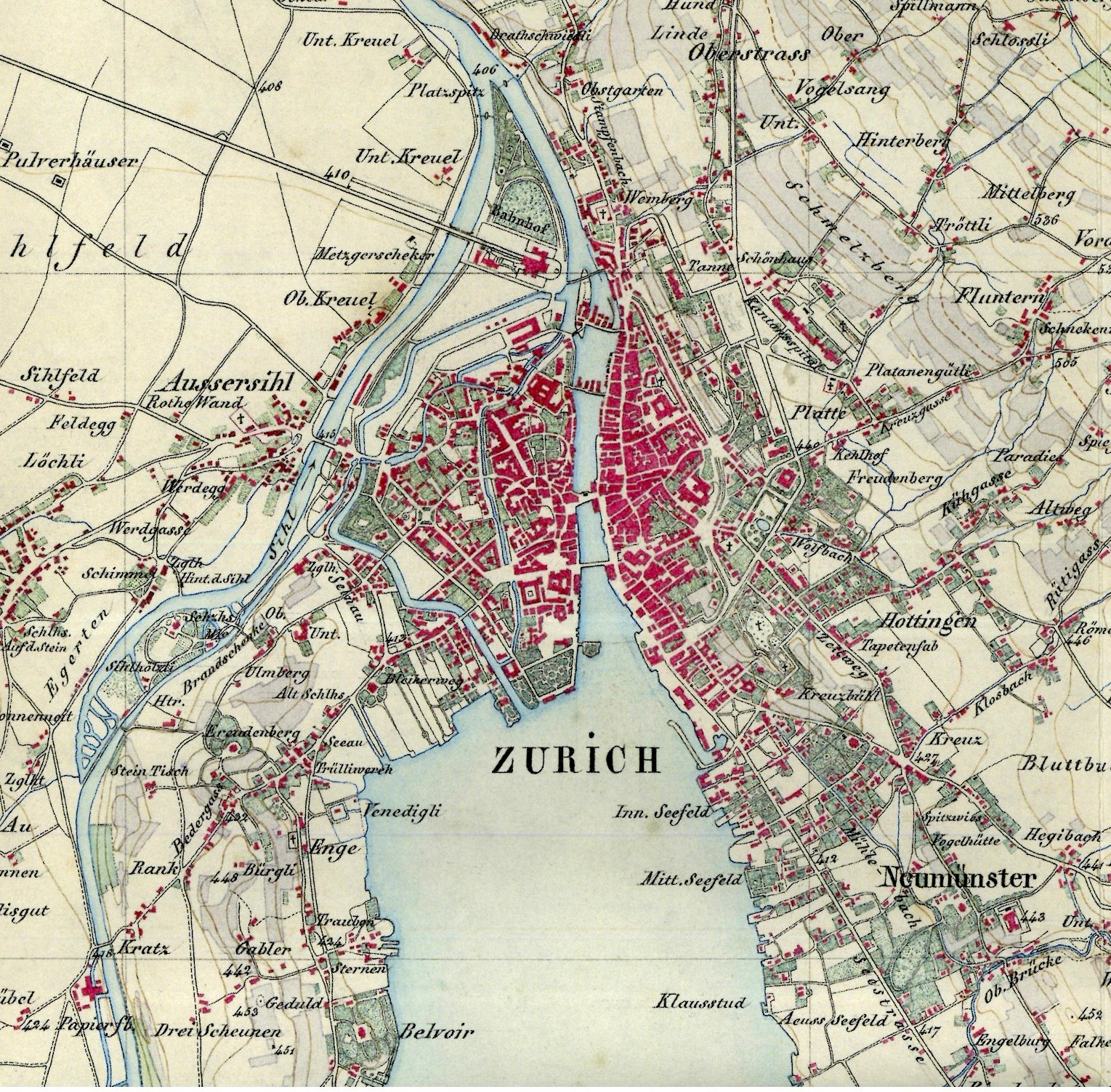 Zürich : Dufourkarte um 1850